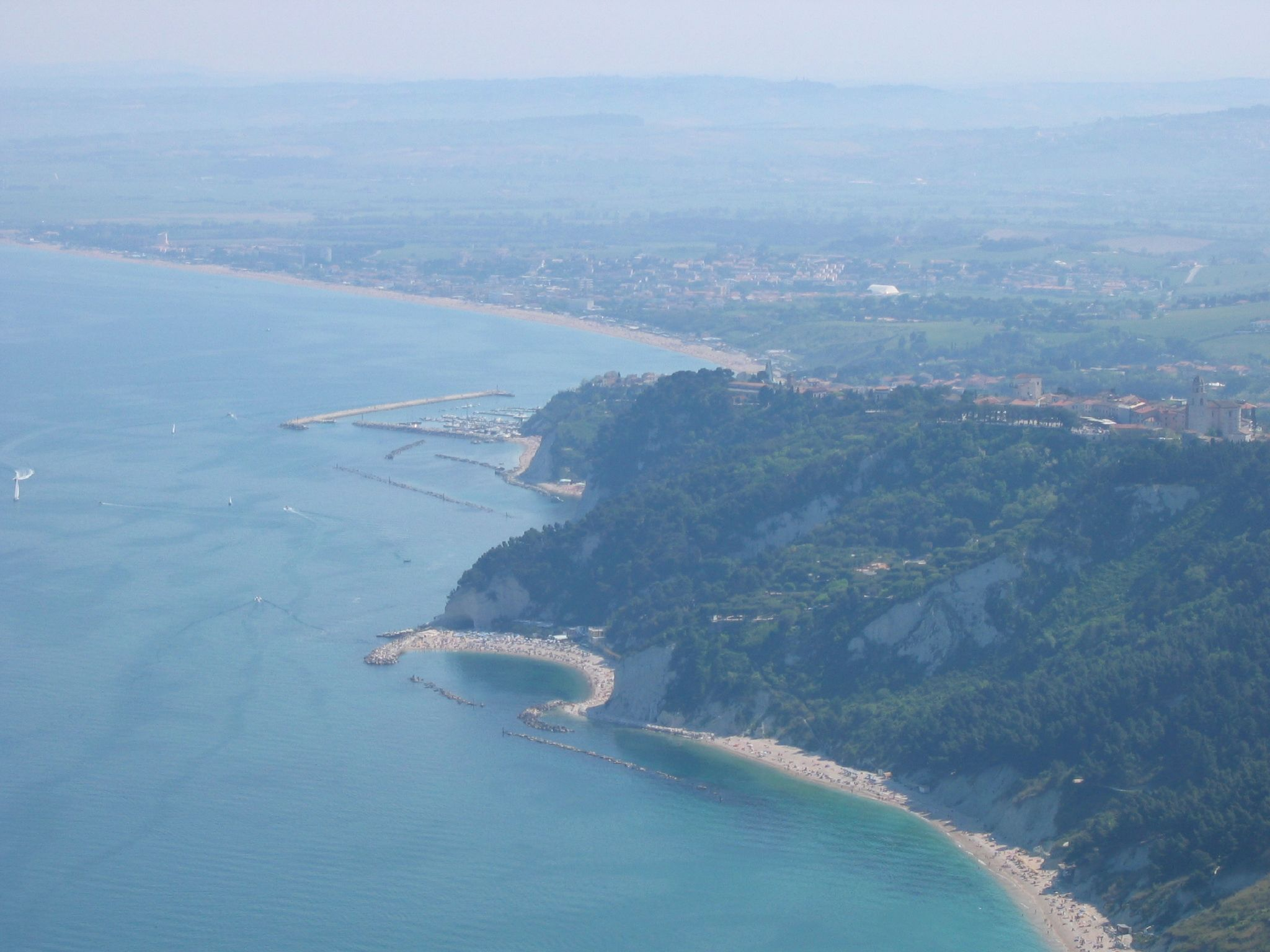 La costa di Sirolo